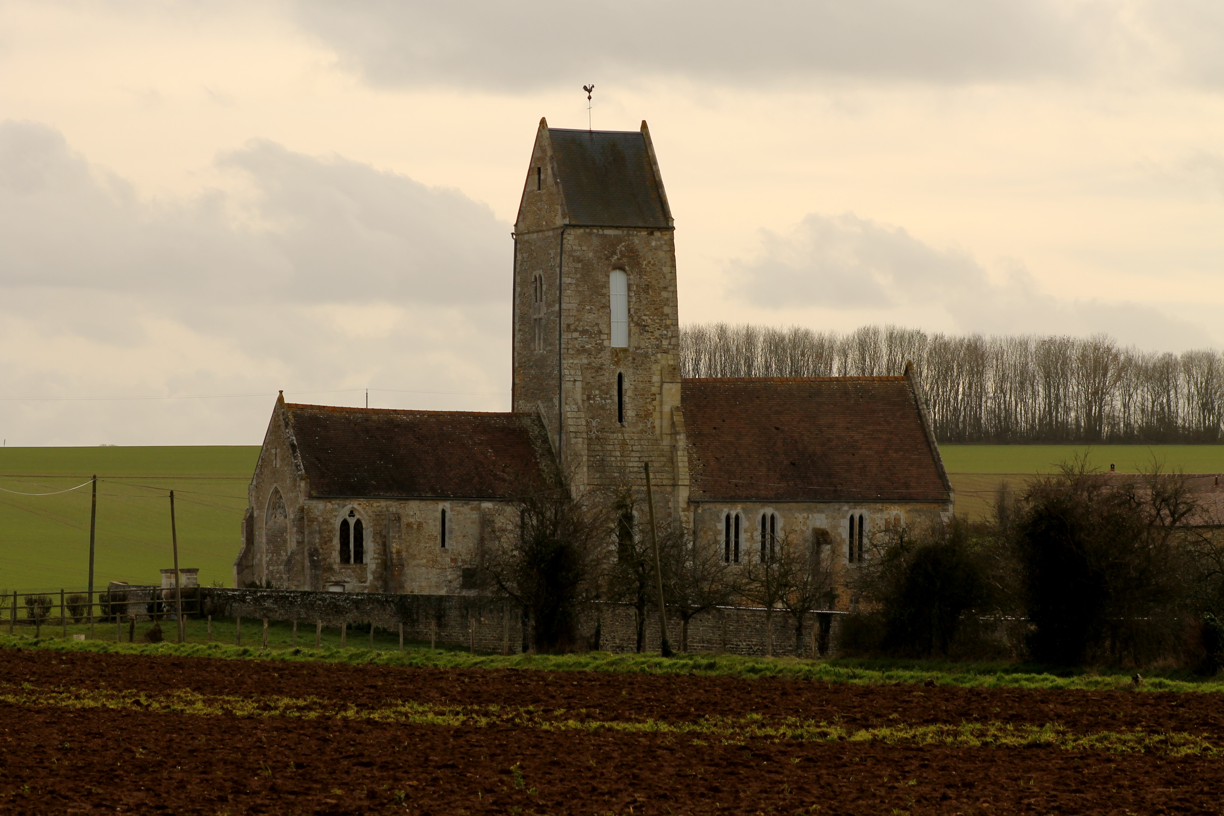 Église Saint Firmin de Placy (Calvados) Base Mémoire